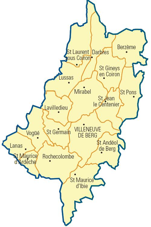 Carte détaillée des communes du canton (Ardèche)